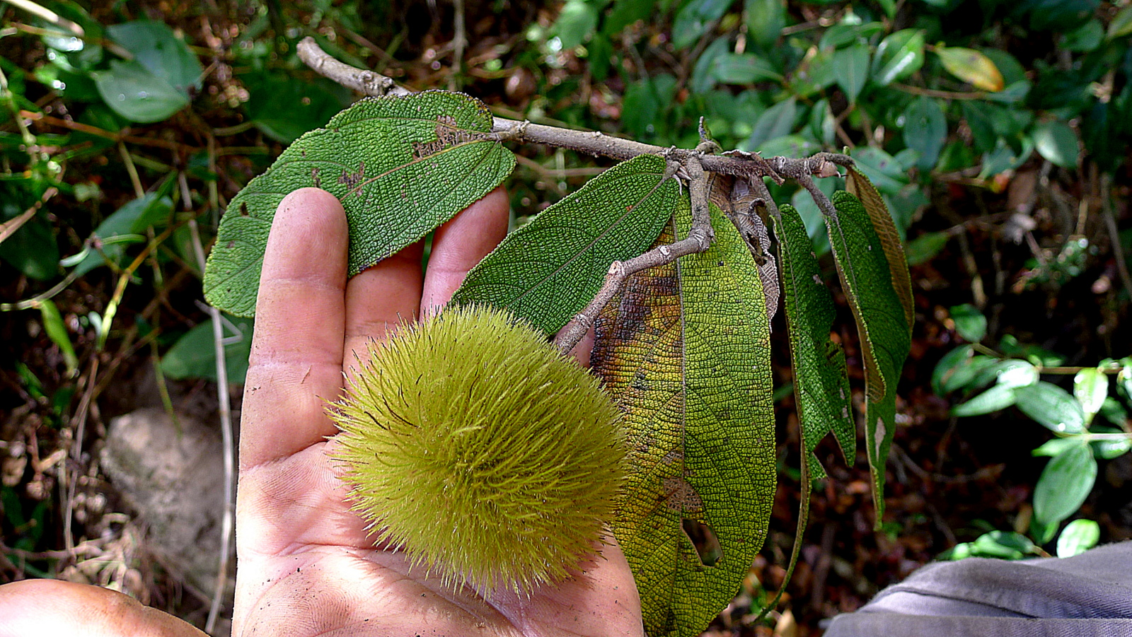 Apeiba albiflora Ducke